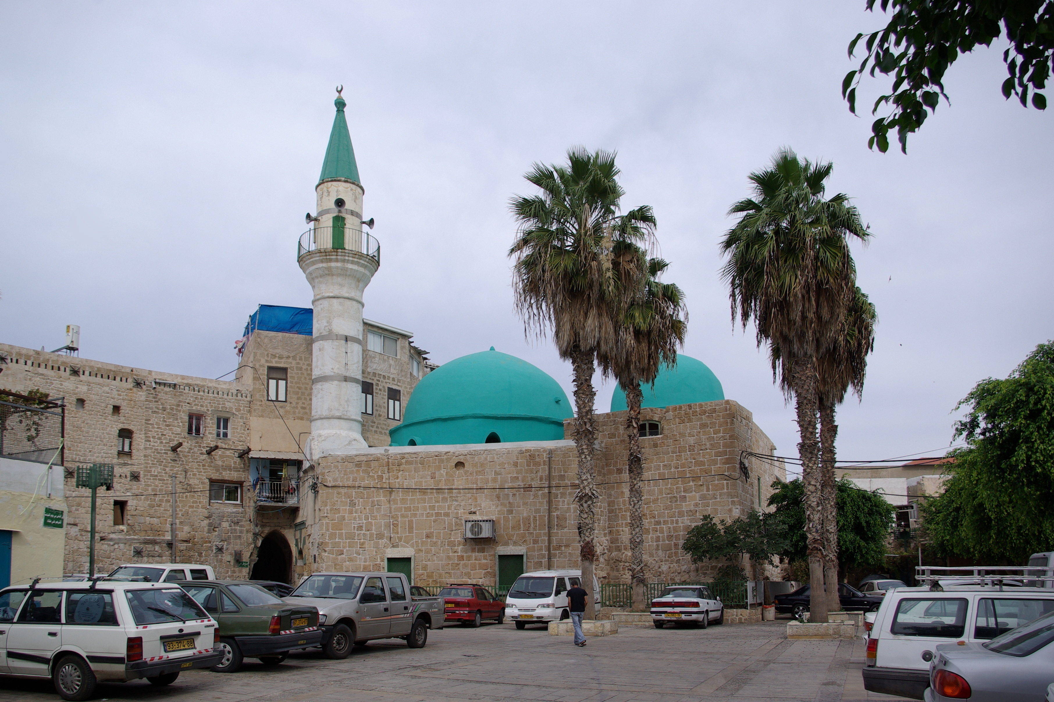 Acre